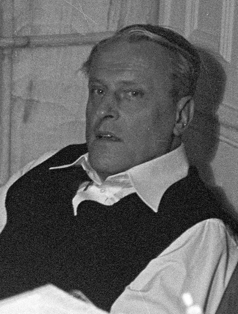 De schrijver WF Hermans in Parijs, 1977 (uitsnede).